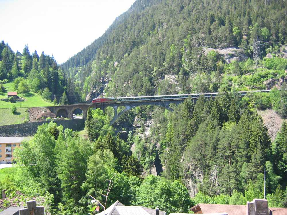 Ein Fernverkehrszug überquert bei Wassen den Viadukt der Maienreuss.